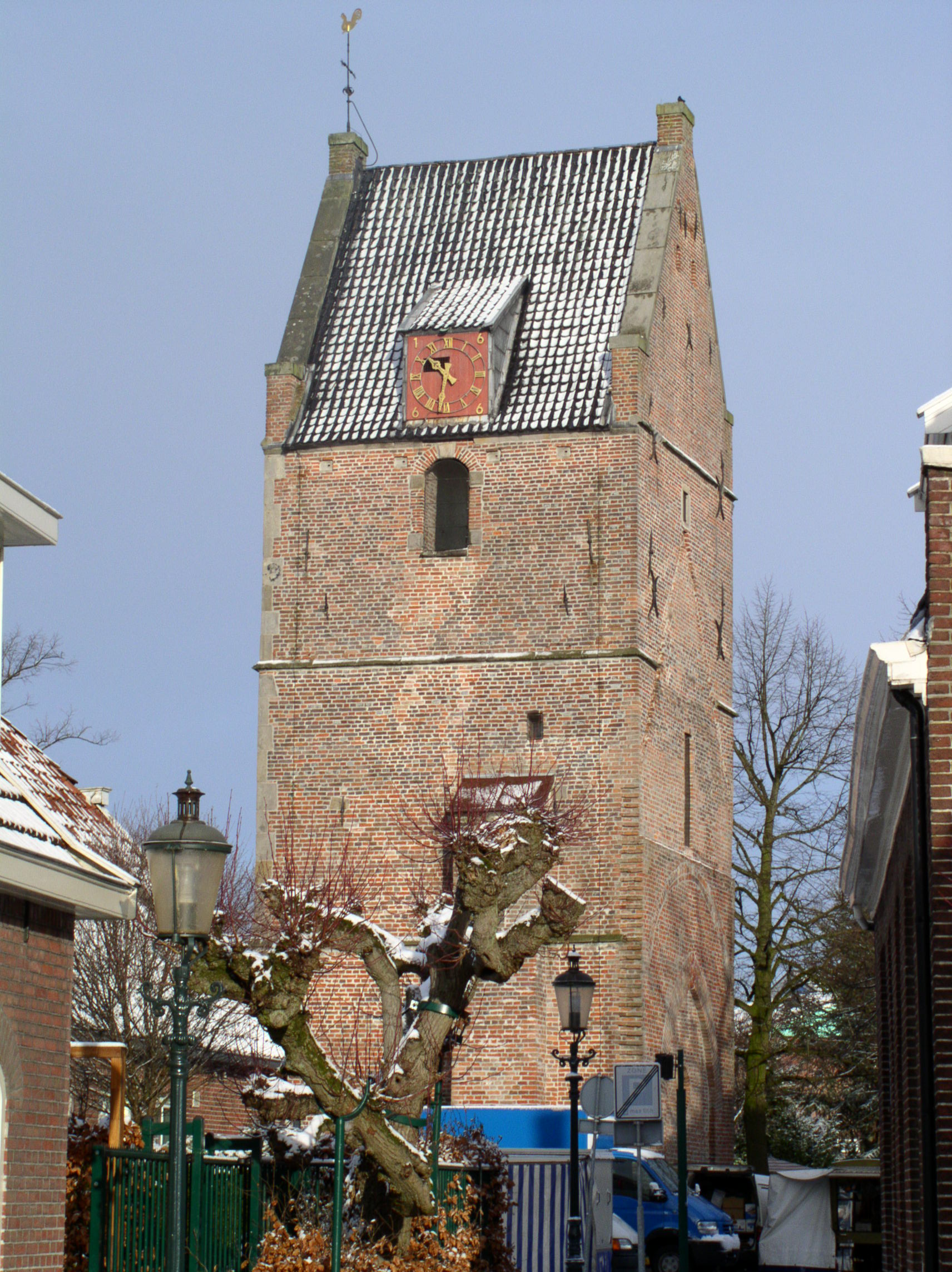 Martinustoren in Losser, (c) 2004 M.H. Olde Heuvel